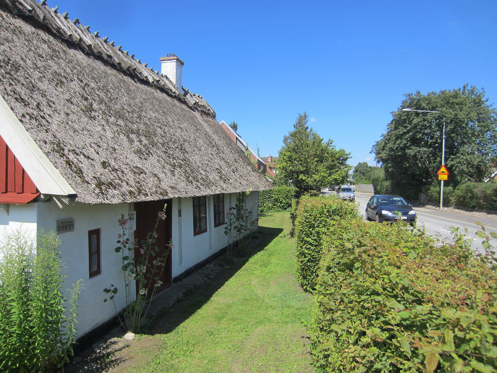 Pålsonhuset, Malmö sedd från landsvägssidan.